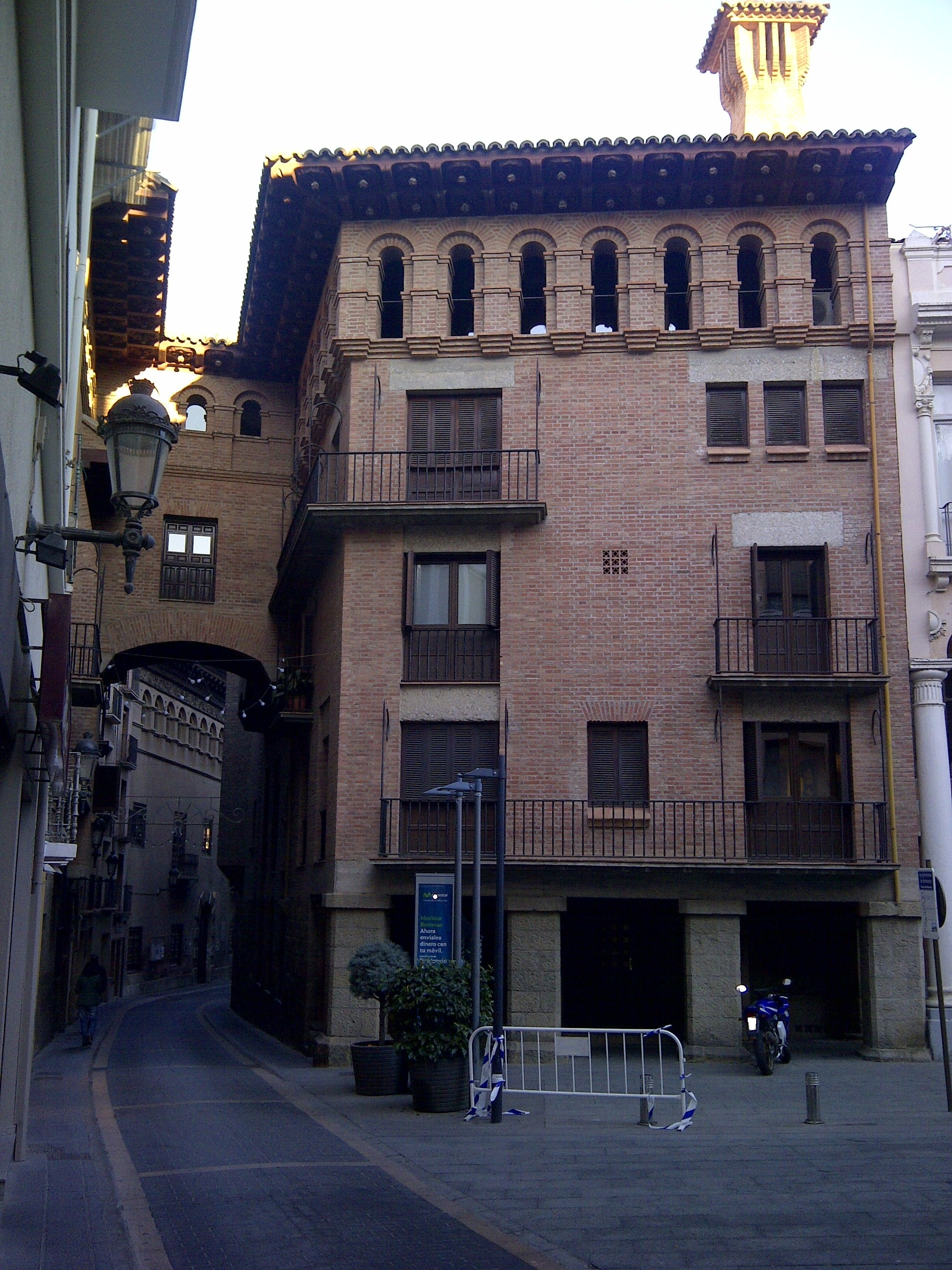 Facciata della casa natale di San Josemaría Escrivá de Balaguer al numero 11 di Plaza del Mercado nella cittadina aragonese di Barbastro, provincia di Huesca. Attualmente è sede del Centro Culturale Entrearcos.